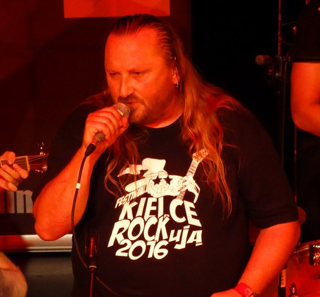 Paweł Wawrzeńczyk 2016r.